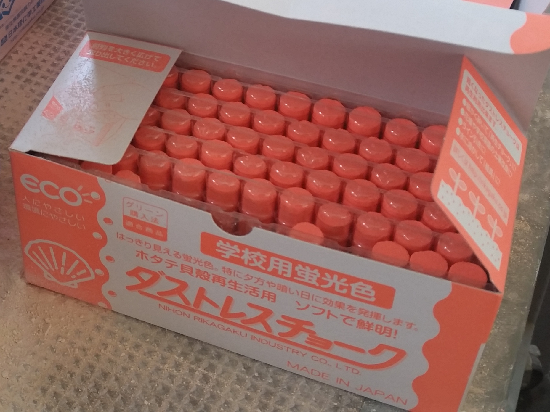 昨日、某高校にて。